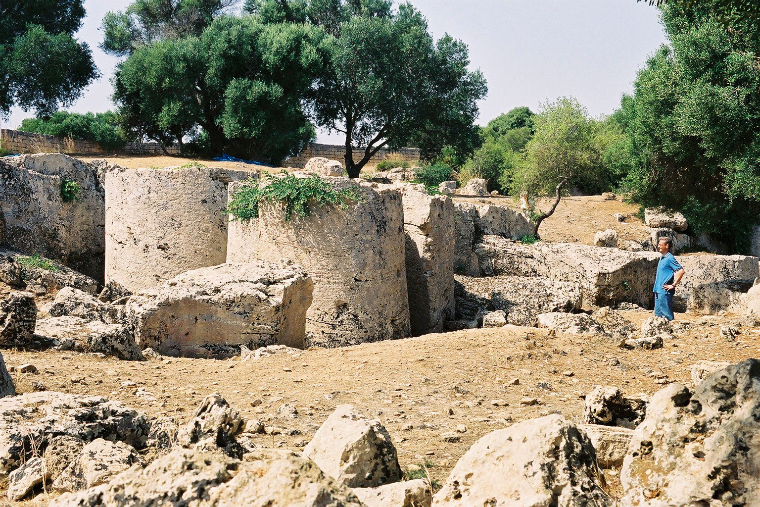 Rocche di Cusa, Campobello di Mazara Quarry for Selinunte, raw columns for unfinished temple G